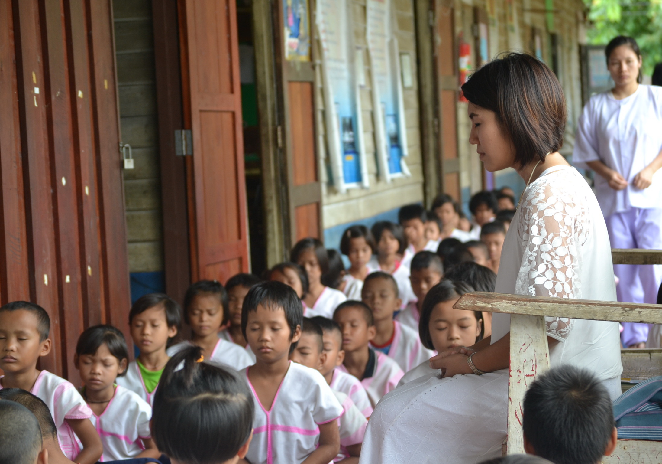 โรงเรียนวิถีพุทธ โรงเรียนบ้านหนองบัว อ.ท่าสองยาง จ.ตาก